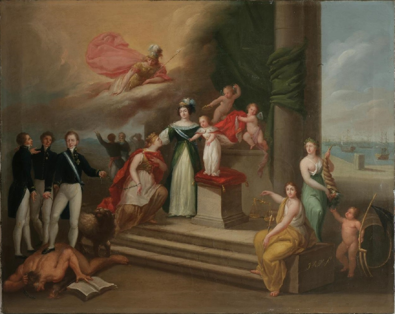 Alegoría de la reina María Cristina de Borbón, esposa de Fernando VII, y de su hija, la reina Isabel II de España.